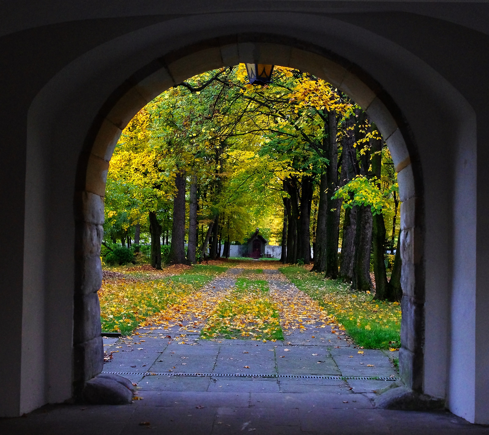 Opactwo Cystersóww w Szczyrzycu